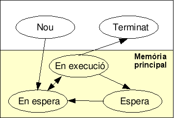 Diagrama d'estats d'un procés en un sistema operatiu amb un model de 7 estats.